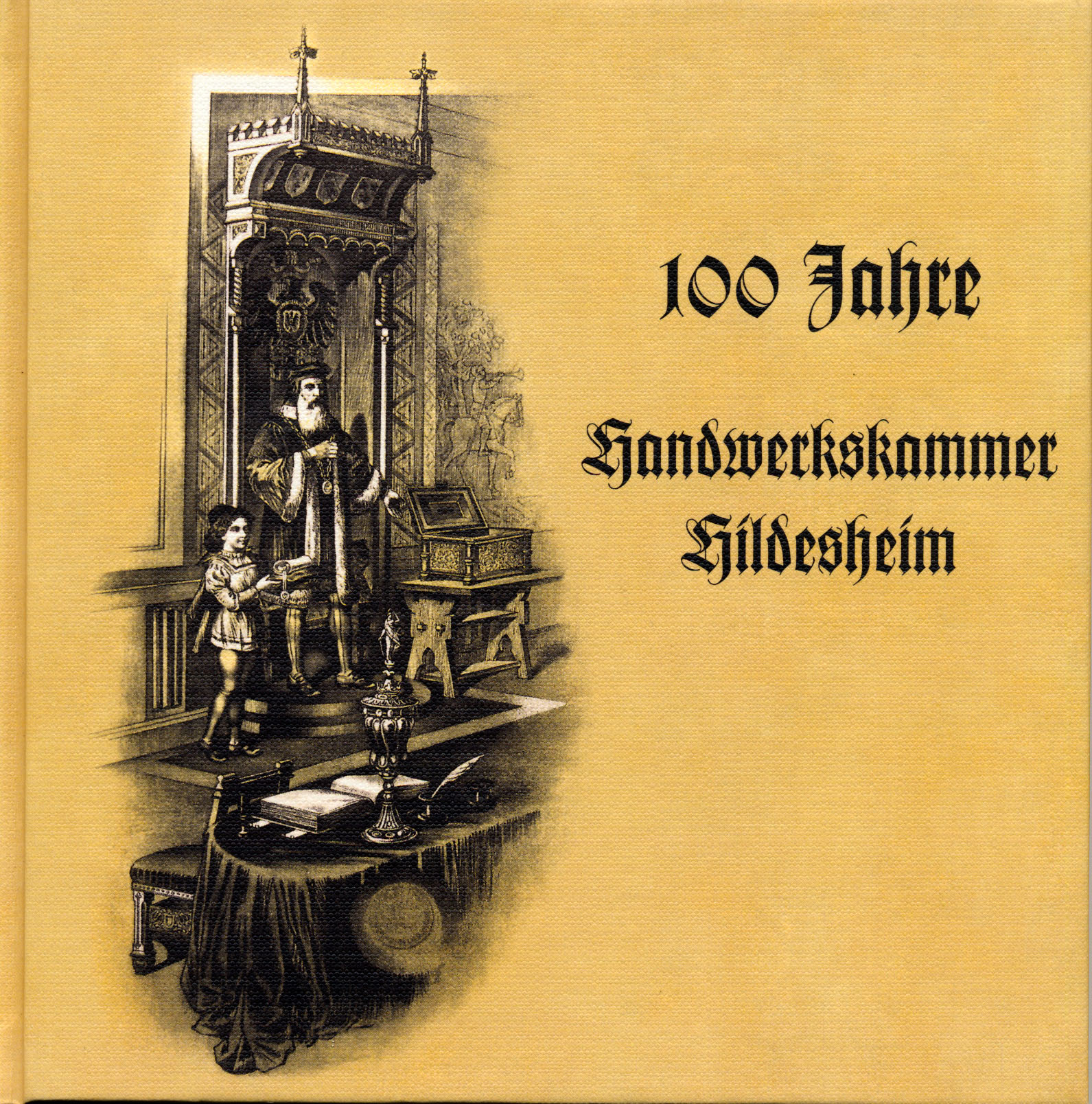 Chronik der Handwerkskammer Hildesheim. Der Buchdeckel zeigt den Ausschnitt eines Meisterbriefes, der ab 1900 bis in die 1930er Jahre hinein, bei der Handwerkskammer Hildesheim Verwendung fand.